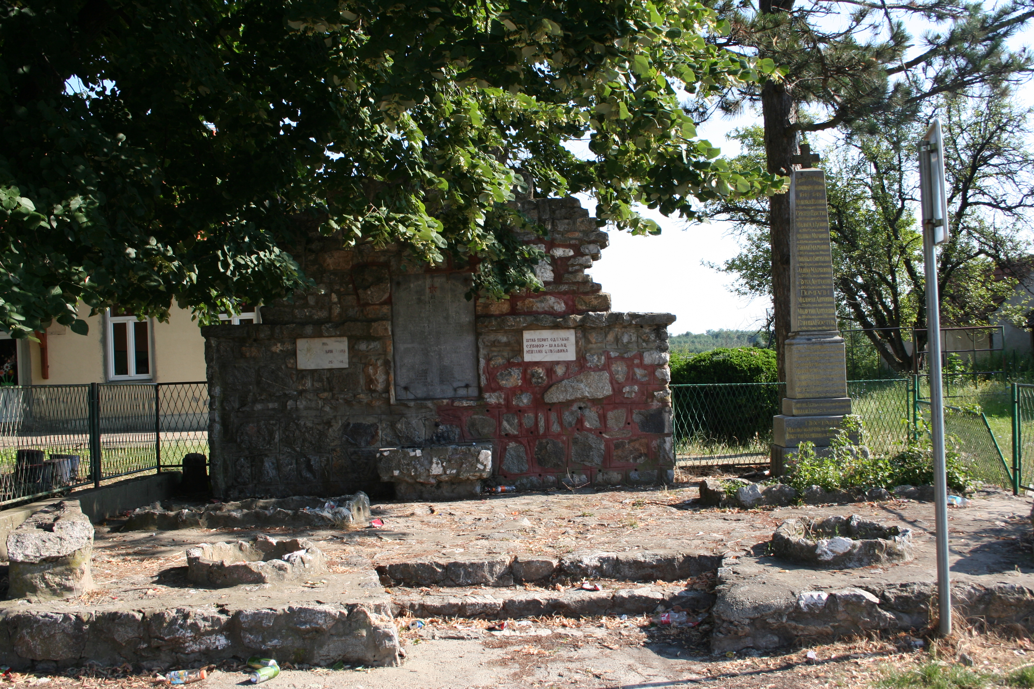 Spomenici u centru sela, Culjković